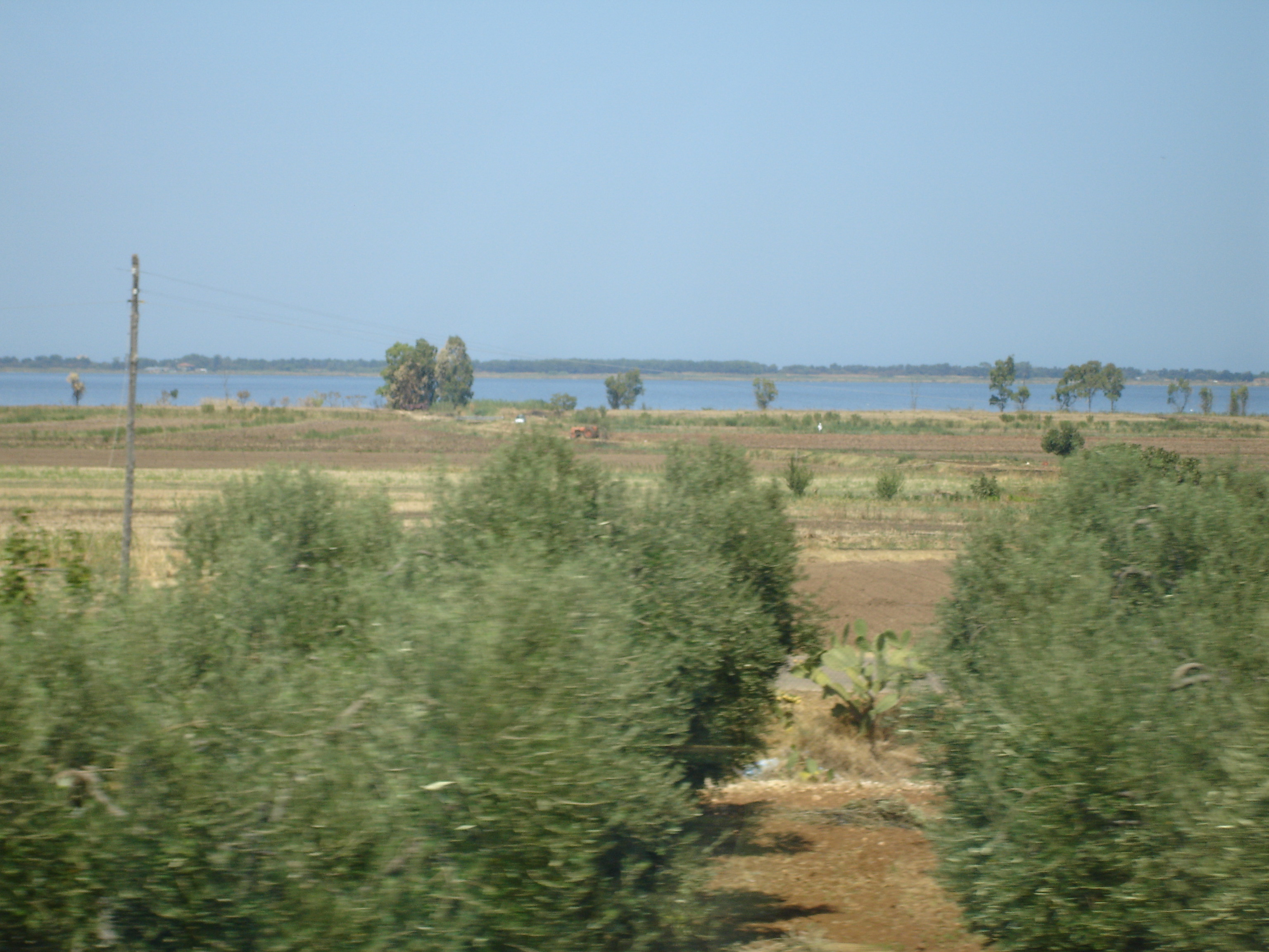 Lago di Lesina, visto da Sud (superstrada)